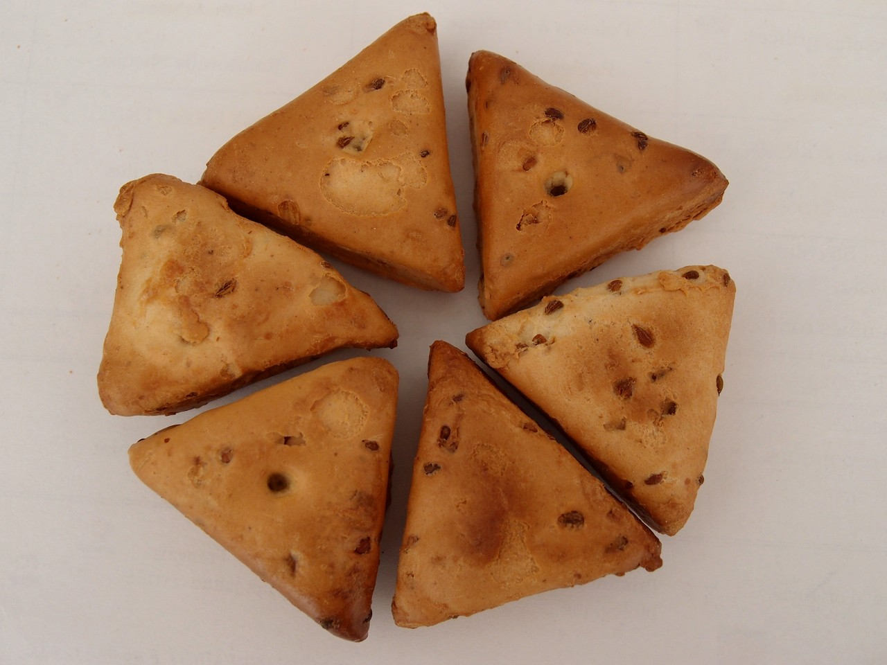 Echaudé : biscuit triangulaire à l'anis fait à Carmaux